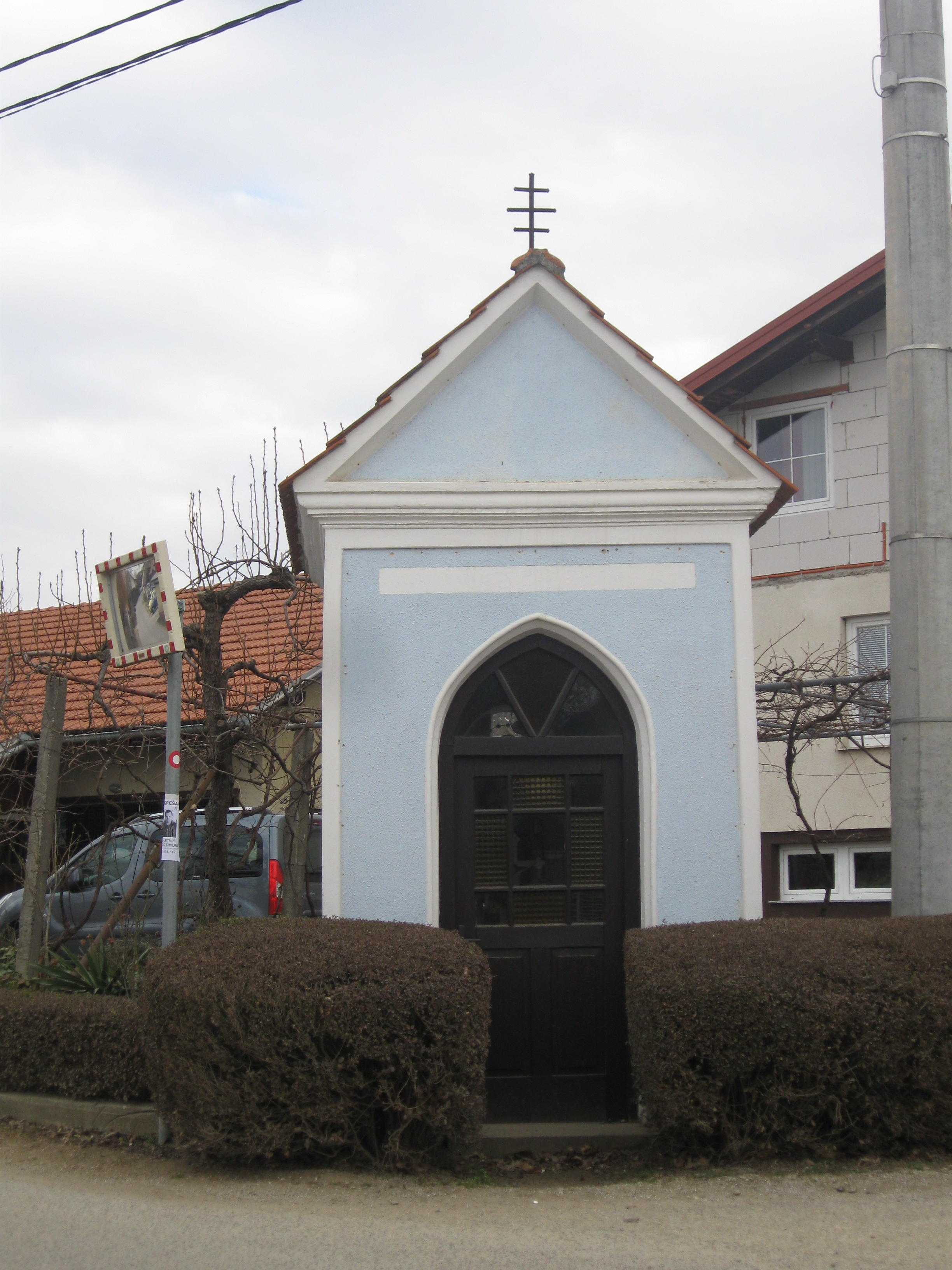 Černelova kapela v Vitomarcih postavljena leta 1928.